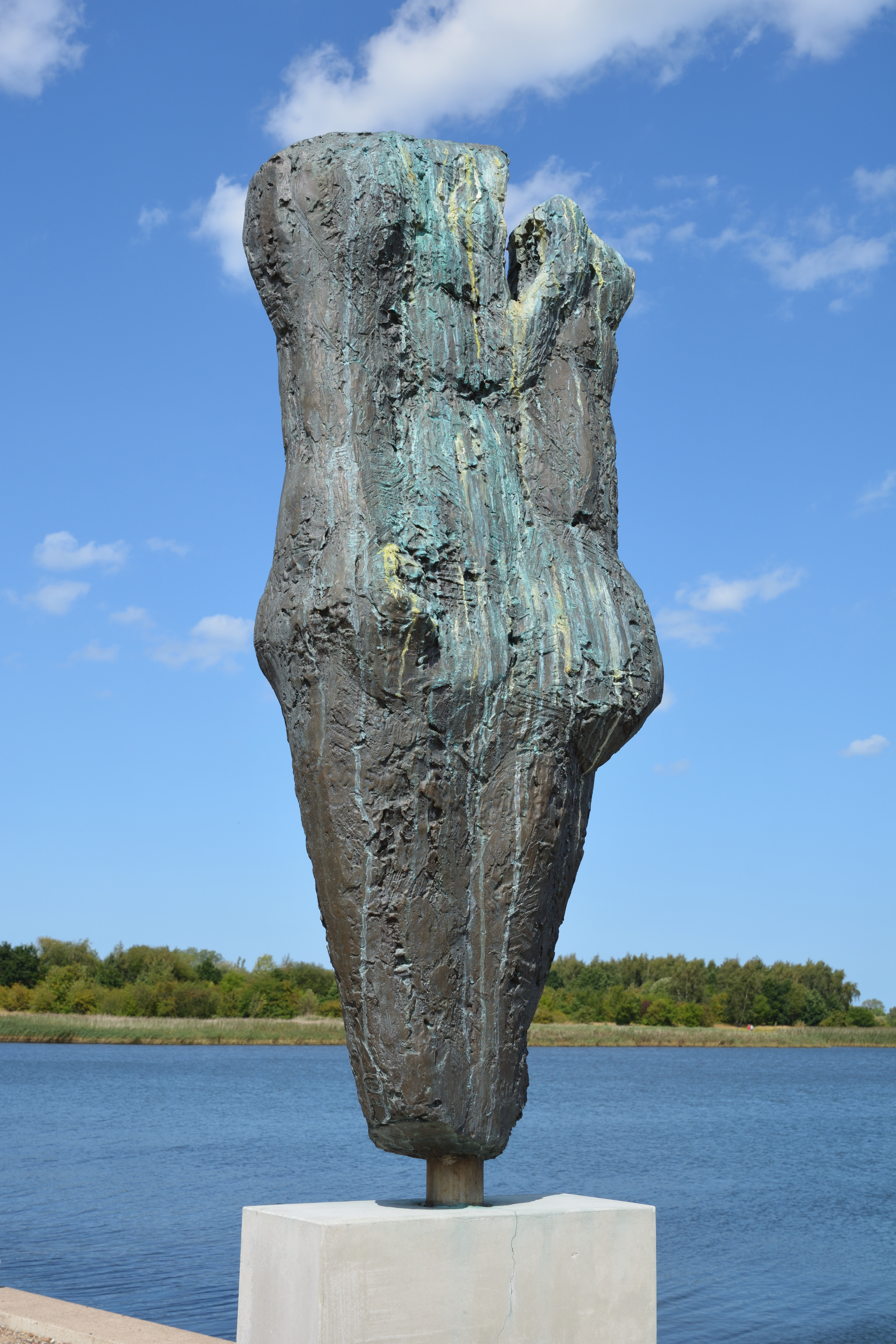 Eine Skulptur am Ufer im IGA-Park in Rostock. Keine Infotafel vorhanden.